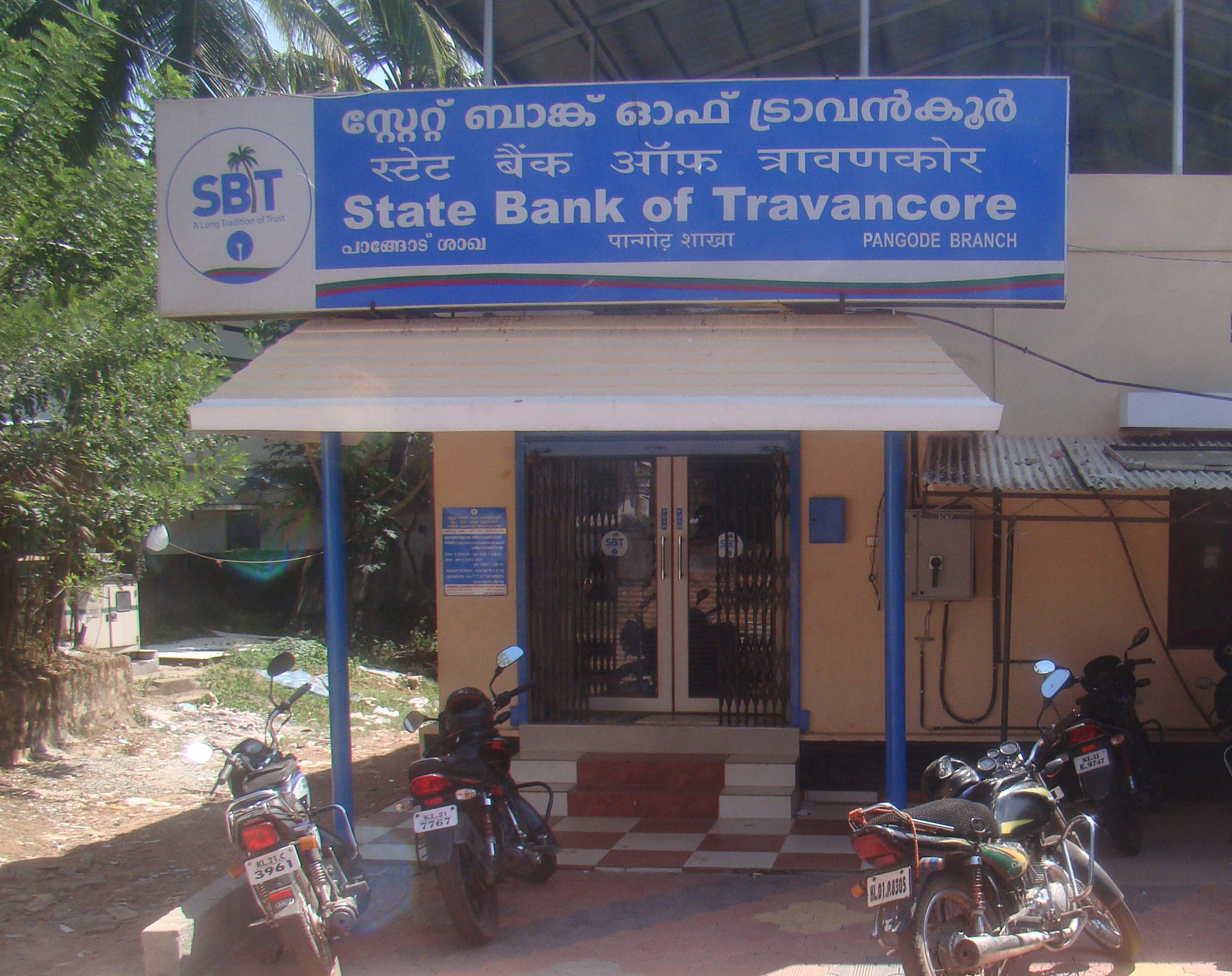 സ്റ്റേറ്റ് ബാങ്ക് ഓഫ് ട്രാവൻകൂർ - പാങ്ങോട് ശാഖയുടെ മുൻ കവാടം.